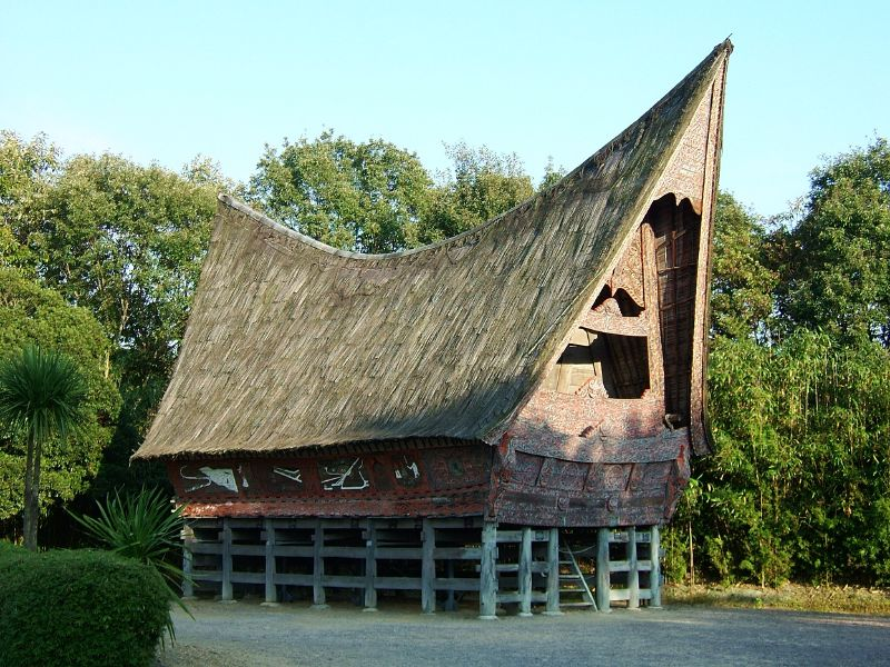 Toba-Batak houseToba-Batak House from Indonesia